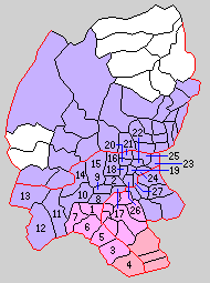 長野県更級郡の町村。